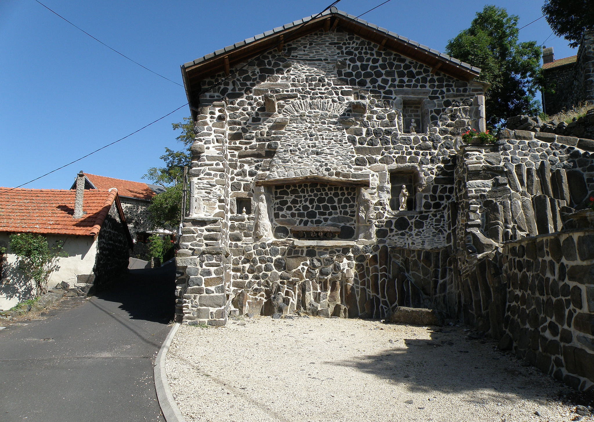 Mézères, dép. de la Haute-Loire, France (Auvergne). Façade latérale d'une maison au pied de la butte de Mézères. On aperçoit l'église en contre-haut à droite.